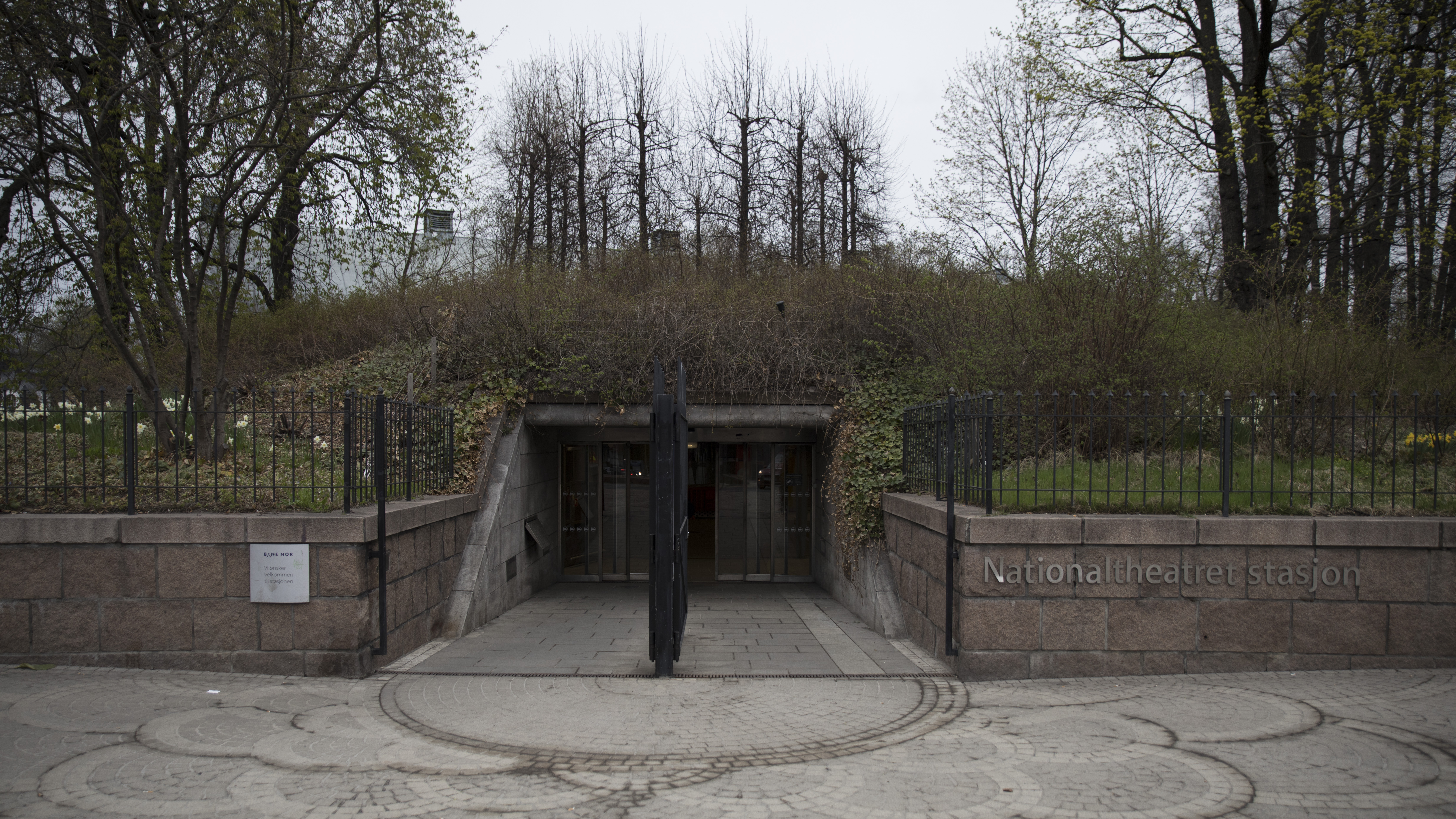 Inngangen til Nationaltheatret fra krysset mellom Inngangen til Nationaltheatret fra Parkveien og Henrik Ibsens Gate